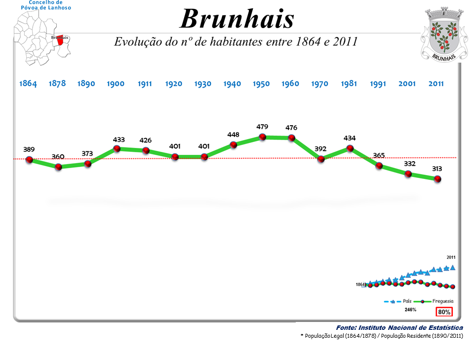 Censos 1864/2011